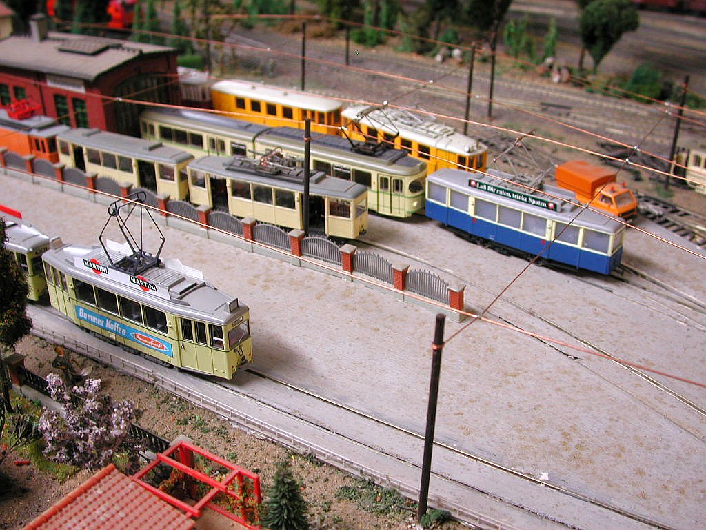 Modellstraßenbahndepot